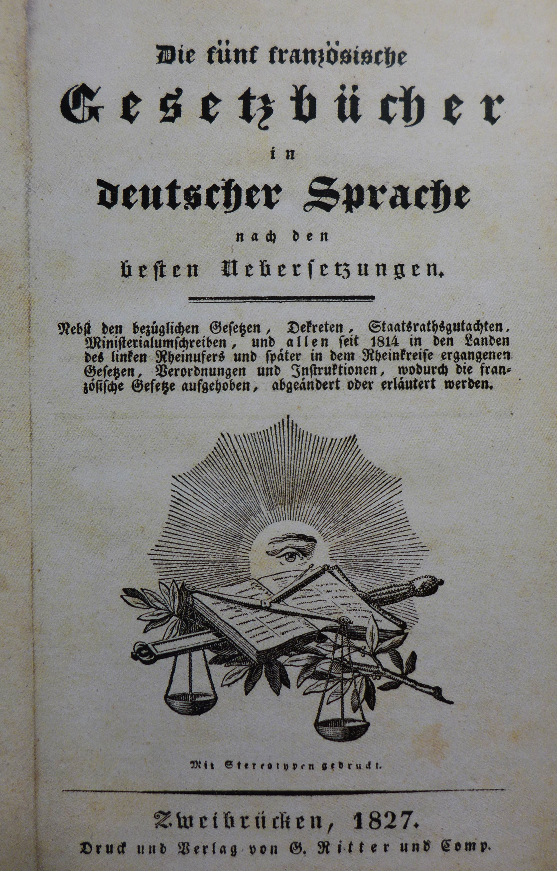 Die fünf französischen Gesetzbücher in deutscher Sprache nach den besten Übersetzung, Zweibrücken, Georg Ritter, 1827, 18,5 x 11,5 cm, Stadtmuseum Zweibrücken; Das französische Gesetzwerk wurde im linksrheinischen Gebiet Deutschlands im Jahr 1804 eingeführt.